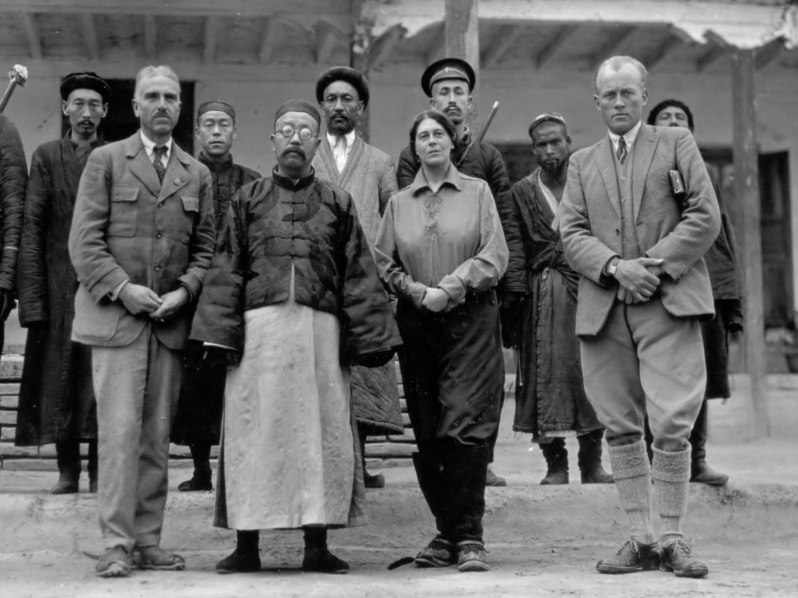 Albumblad met vier foto's. Linksboven: de Ambaan van de Nieuwe Stad op bezoek in Yarkand met van links naar rechts Ph.C. Visser, de Ambaan, Jenny Visser-Hooft, J.A. Sillem; linksonder: een muzikant in Yarkand; rechtsboven: uitzicht op bouwland in Yarkand, rechtsonder: de bedienden Asis, Oguldan, Mohammed Achoen in Yarkand 1930/04/11